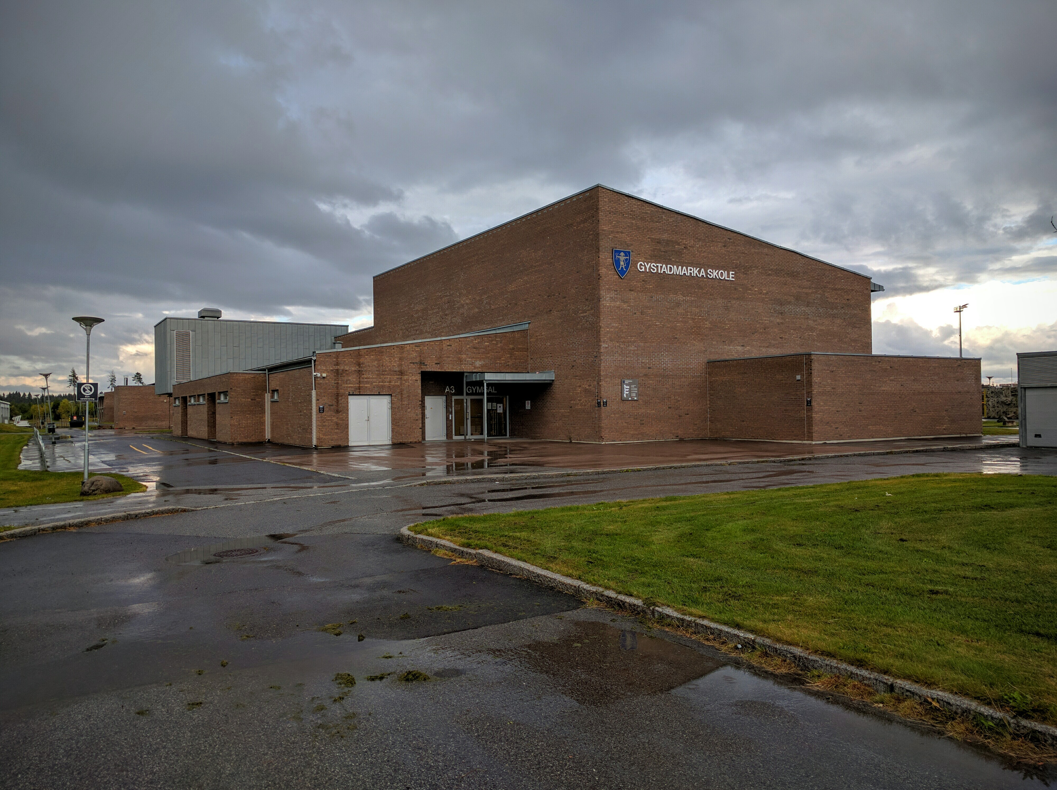 Gystadmarka skole på Jessheim